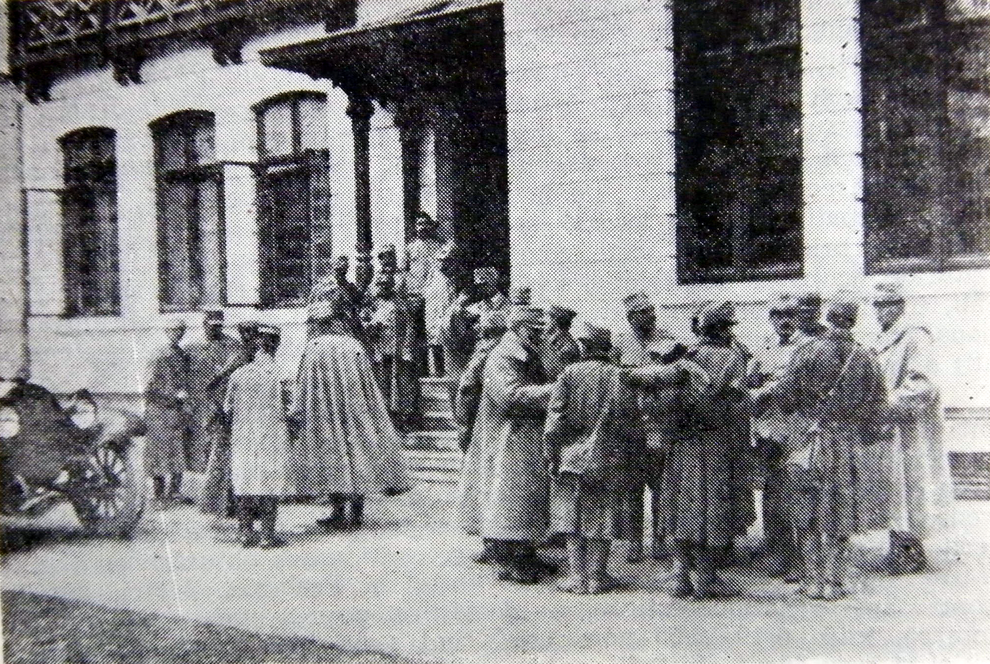 1916 - Sediul Marelui Cartier General de la Peris, România